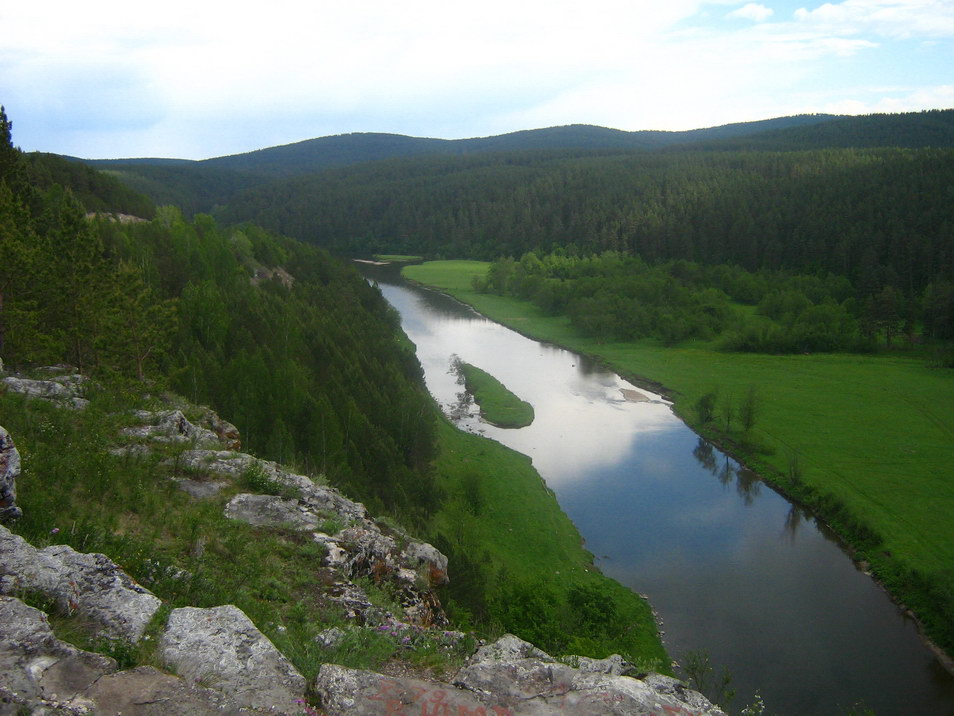 Река Катав, Марьин утёс, рядом с трассой М5